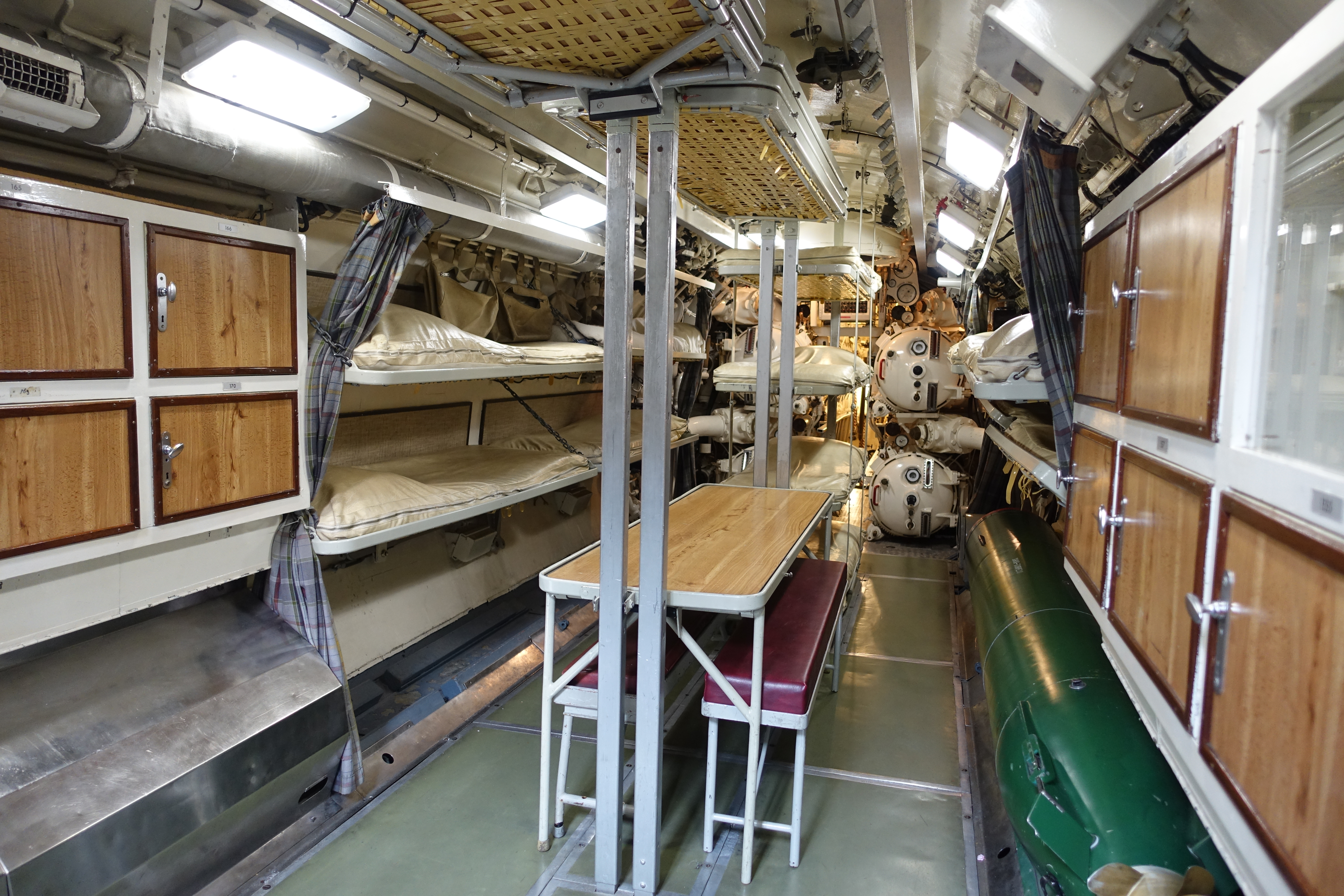 Interieur met kastjes, eettafel en slaapbanken in onderzeeboot Tonijn Marinemuseum Den Helder